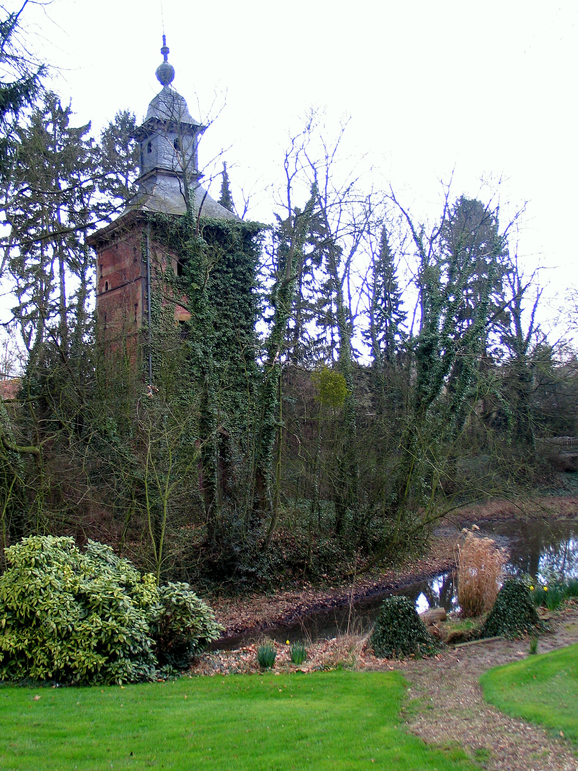 Bethaniakasteel te Hoeselt, België